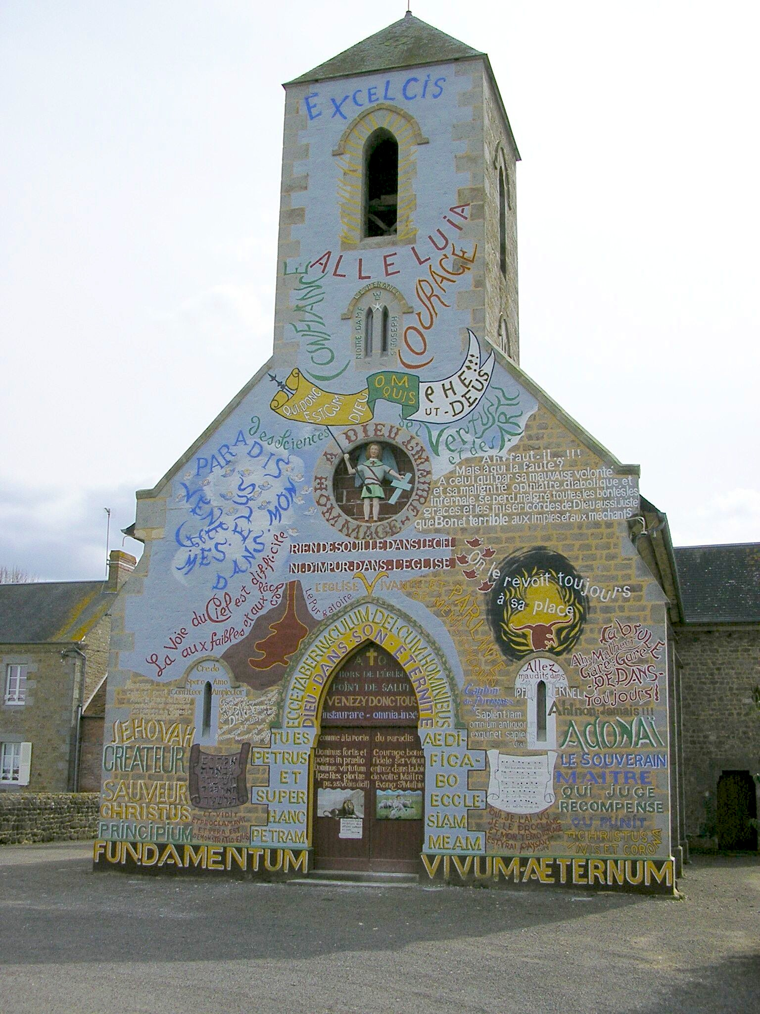 Façade de l'eglise de Menil-Gondouin, Orne